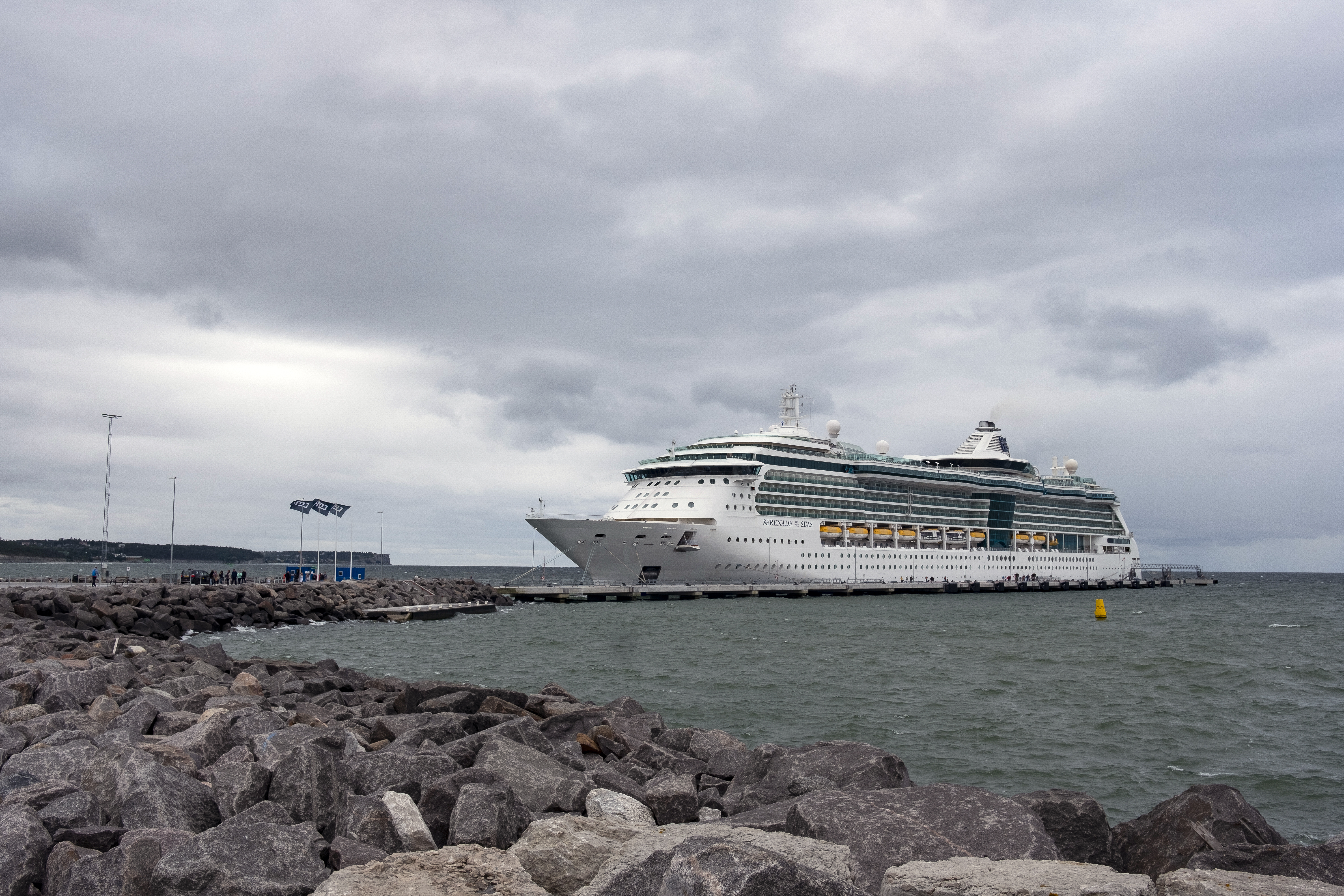 20190702 Almedalsveckan i Visby på Gotland. Kryssningsfartyget Serenade of the Seas i kryssningshamnen i Visby som drivs av Copenhagen Malmö Port. Photo: News Øresund - Johan Wessman © News Øresund - Johan Wessman (CC BY 3.0). Detta verk av News Øresund är licensierat under en Creative Commons Erkännande 3.0 Unported-licens (CC BY 3.0). Bilden får fritt publiceras under förutsättning att källa anges. .The picture can be used freely under the prerequisite that the source is given. News Øresund, Malmö, Sweden News Øresund är en oberoende regional nyhetsbyrå som är en del av det oberoende dansk-svenska kunskapscentrat Øresundsinstituttet.. .